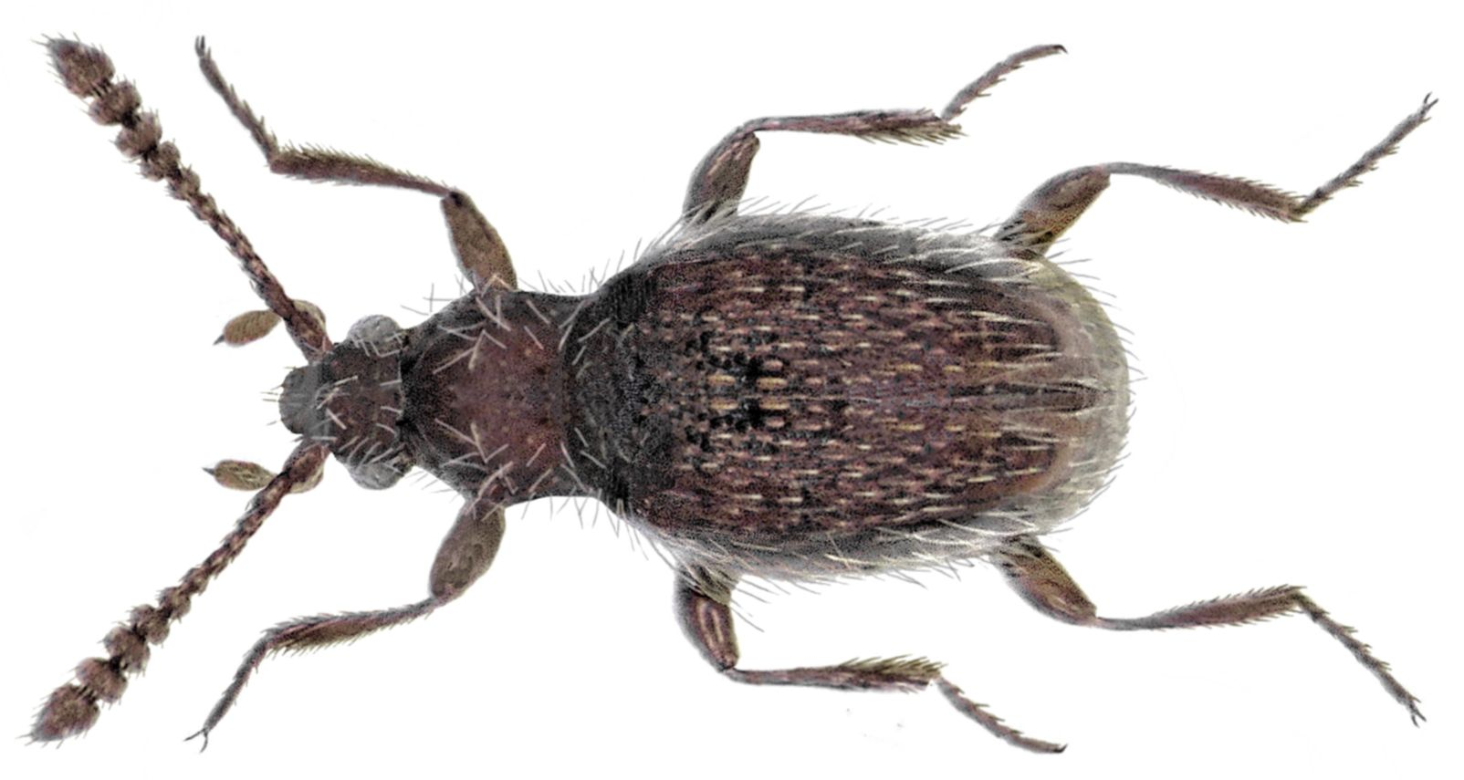 Familie: Scydmaenidae Groesse: 1,3 mm Verbreitung: Europa Ökologie: in Waldstreu, Moos und humoser Erde Fundort: Germania, Thüringen leg.det. A.Weigel, 2006 Foto: U.Schmidt, 2006